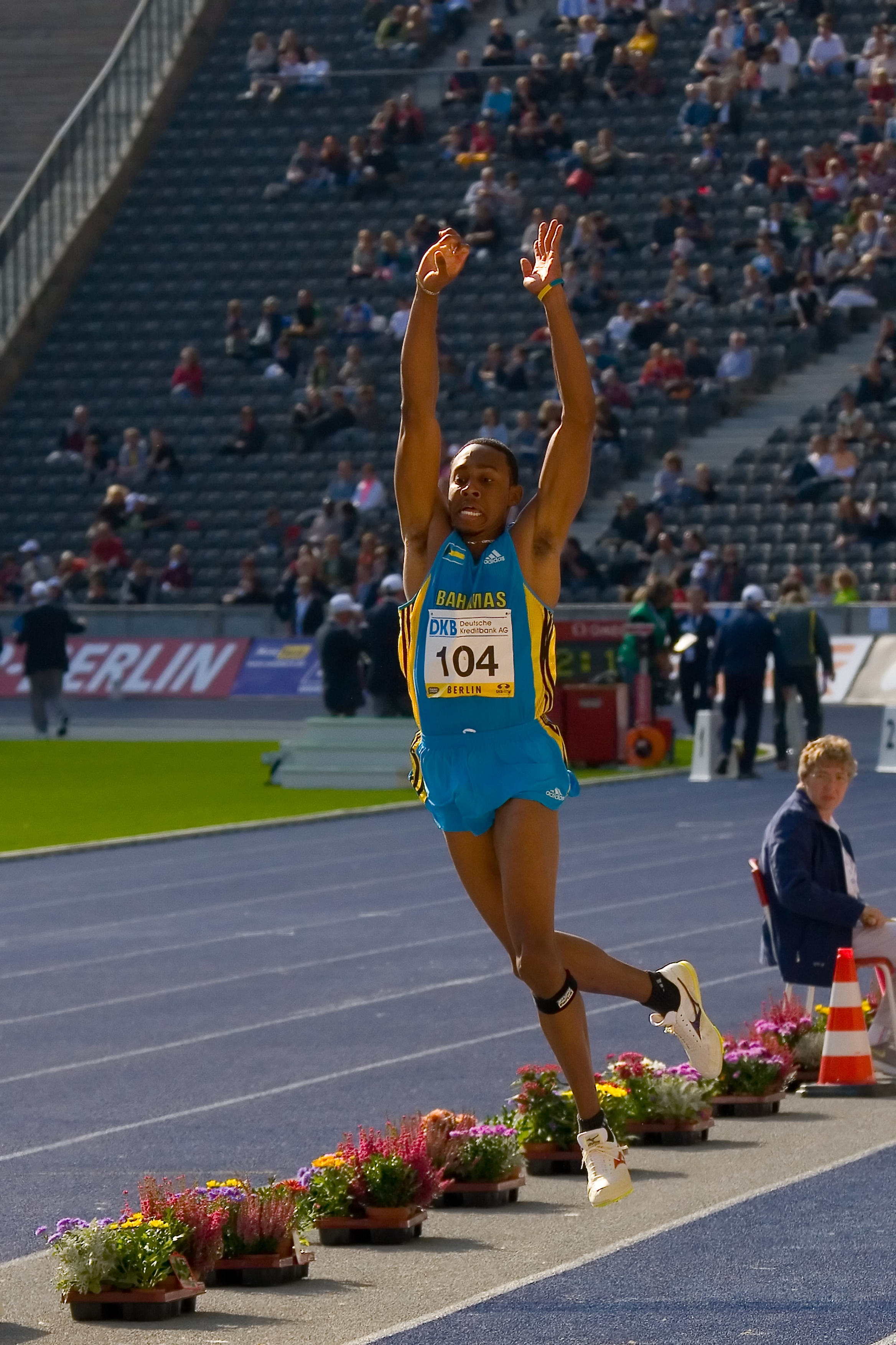 Leevan Sands al Meeting di Berlino in una tappa della Golden Ligue del 2007.